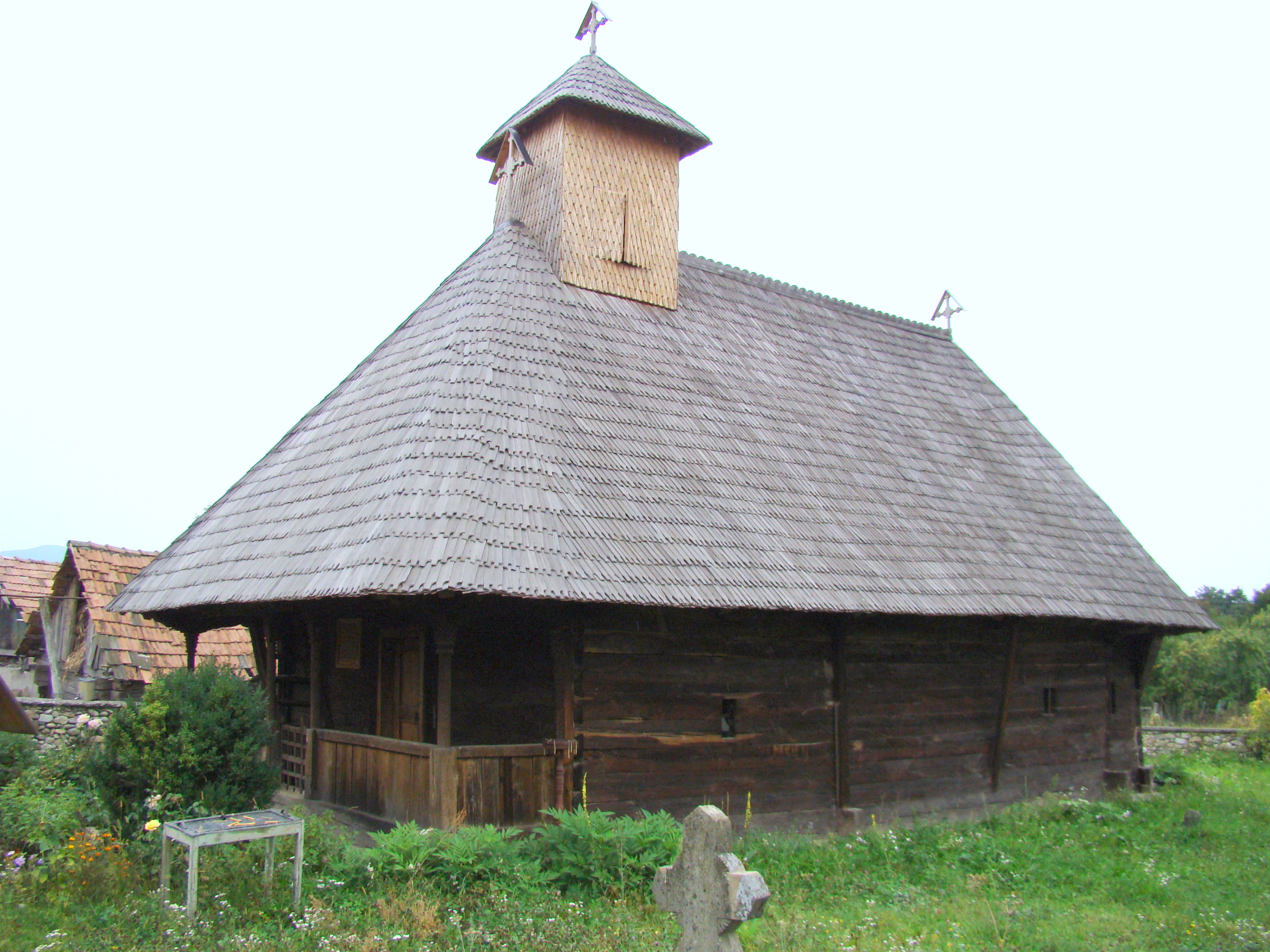 Biserica de lemn „Cuvioasa Paraschiva” din Peștișani, județul Gorj